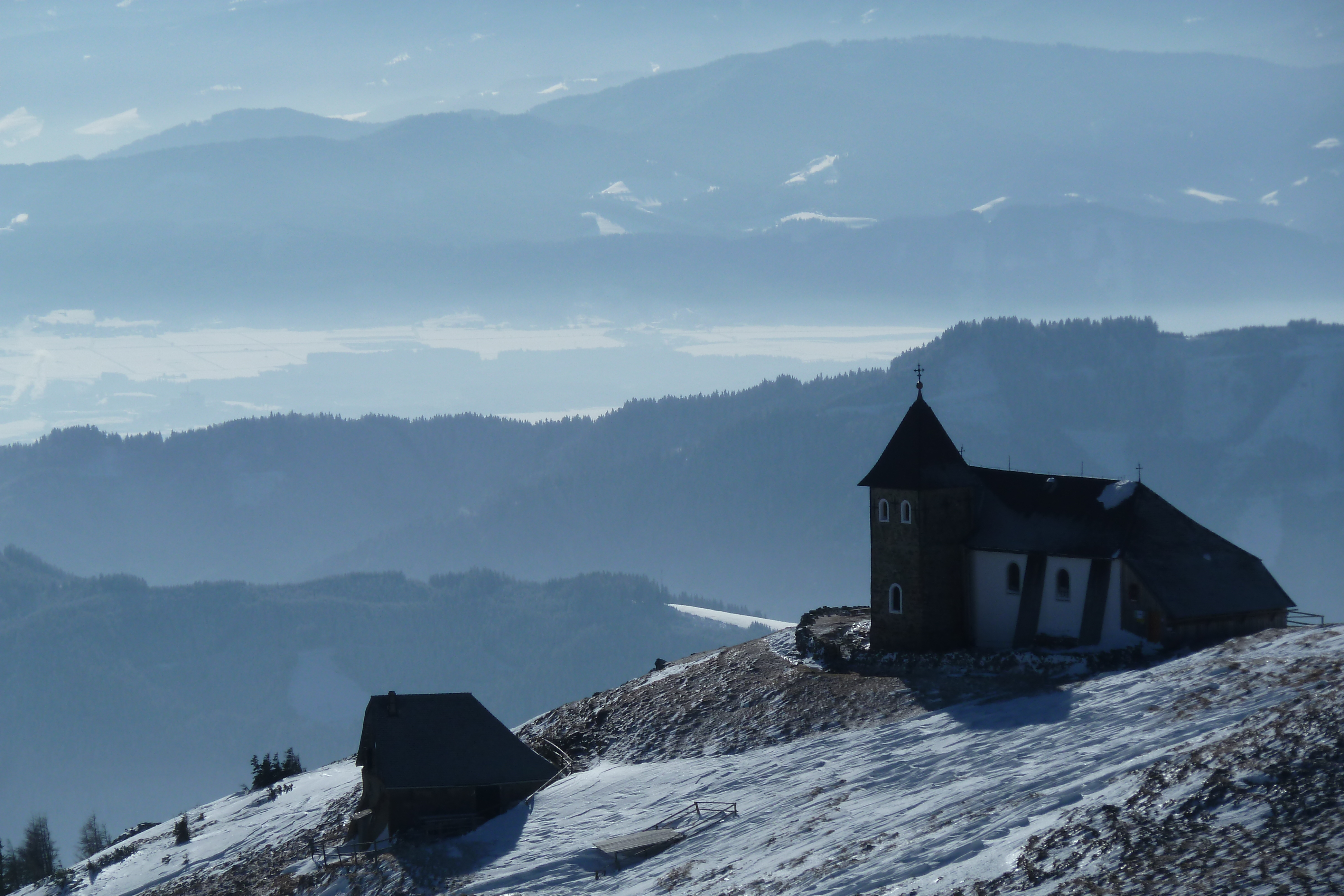 Wallfahrtskirche Maria Schnee und Wirtschaftsgebäude